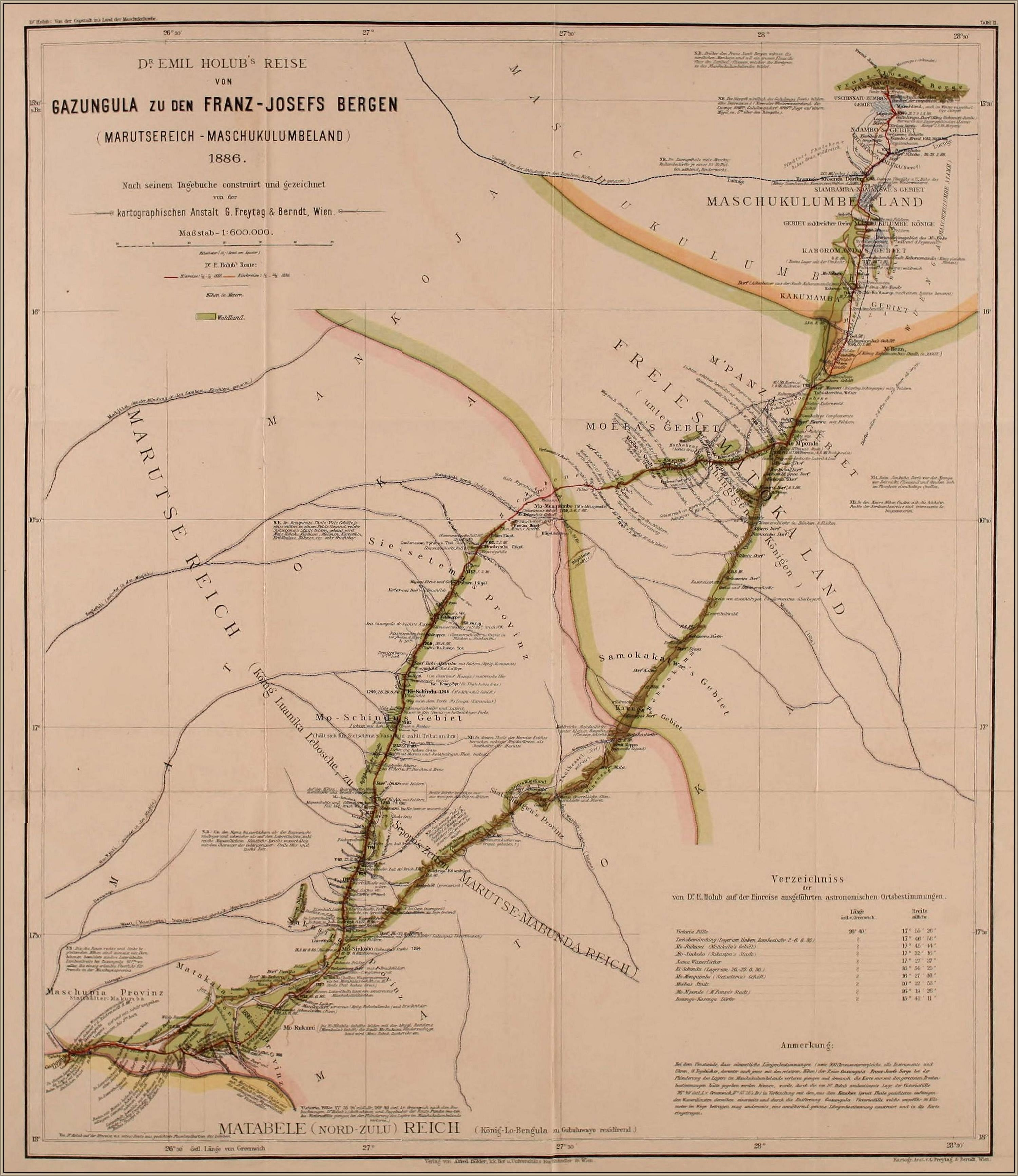 Emil Holub (Holice, 1847. október 7. – Bécs, 1902. február 21.), cseh orvos, utazó, Afrika-felfedező, író, néprajzi gyűjtő.